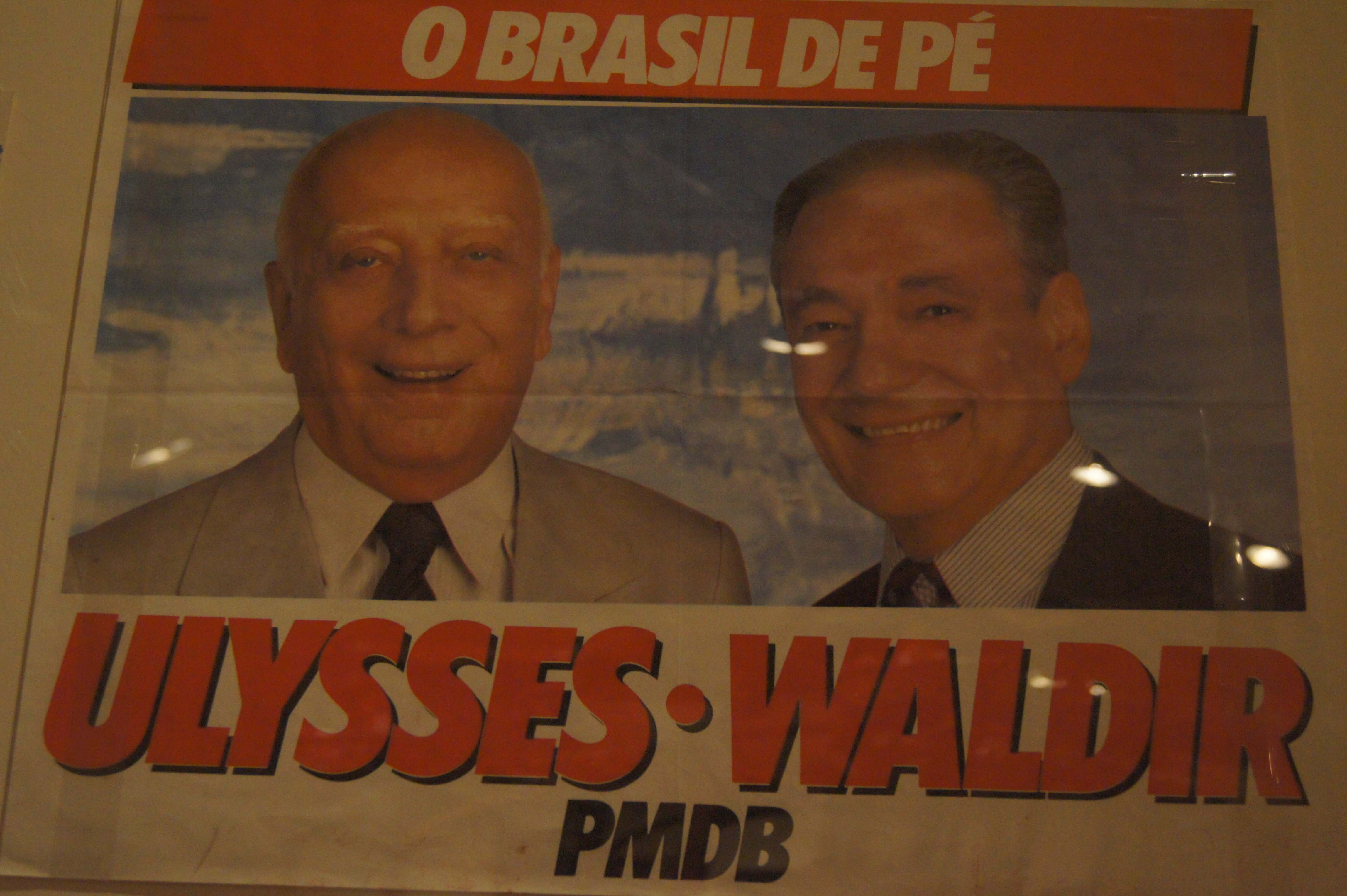 Museu Histórico Nacional